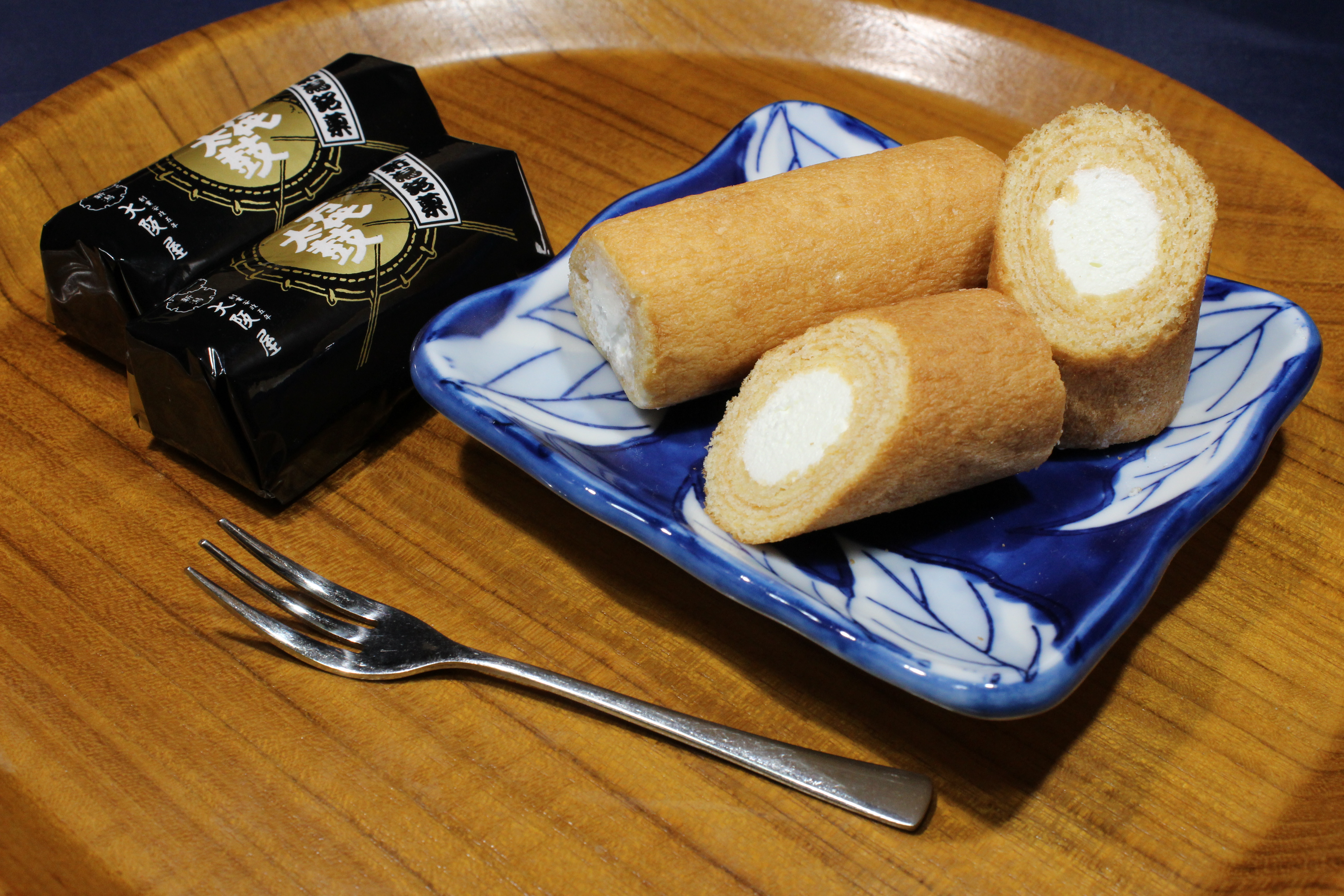 大阪屋 新潟銘菓「万代太鼓」